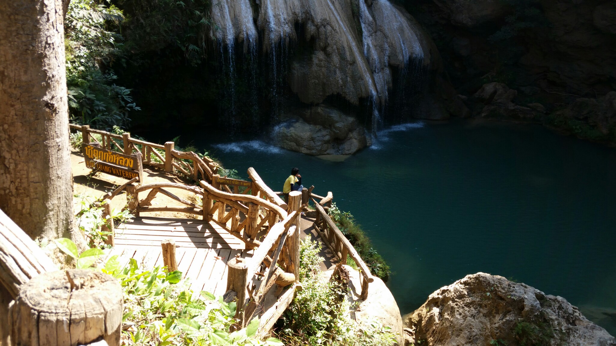 อุทยานแห่งชาติแม่ปิง น้ำตกก้อหลวง เป็นน้ำตกที่จะมีสีเขียวมรกต โดยเฉพาะในฤดูหนาว และมีบรรยากาศที่ร่มรื่น ยังไม่มีมนุษย์เข้ามารุกราน